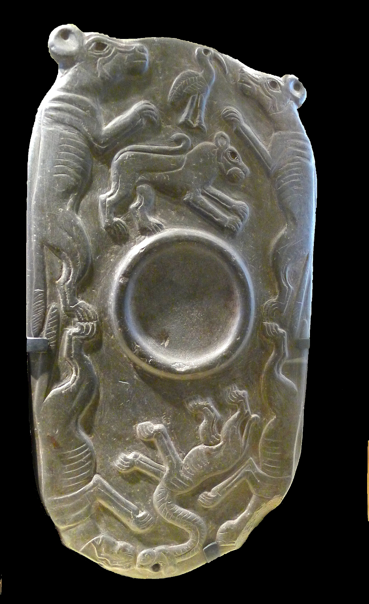 Palette à fard dite « aux quadrupèdes ».